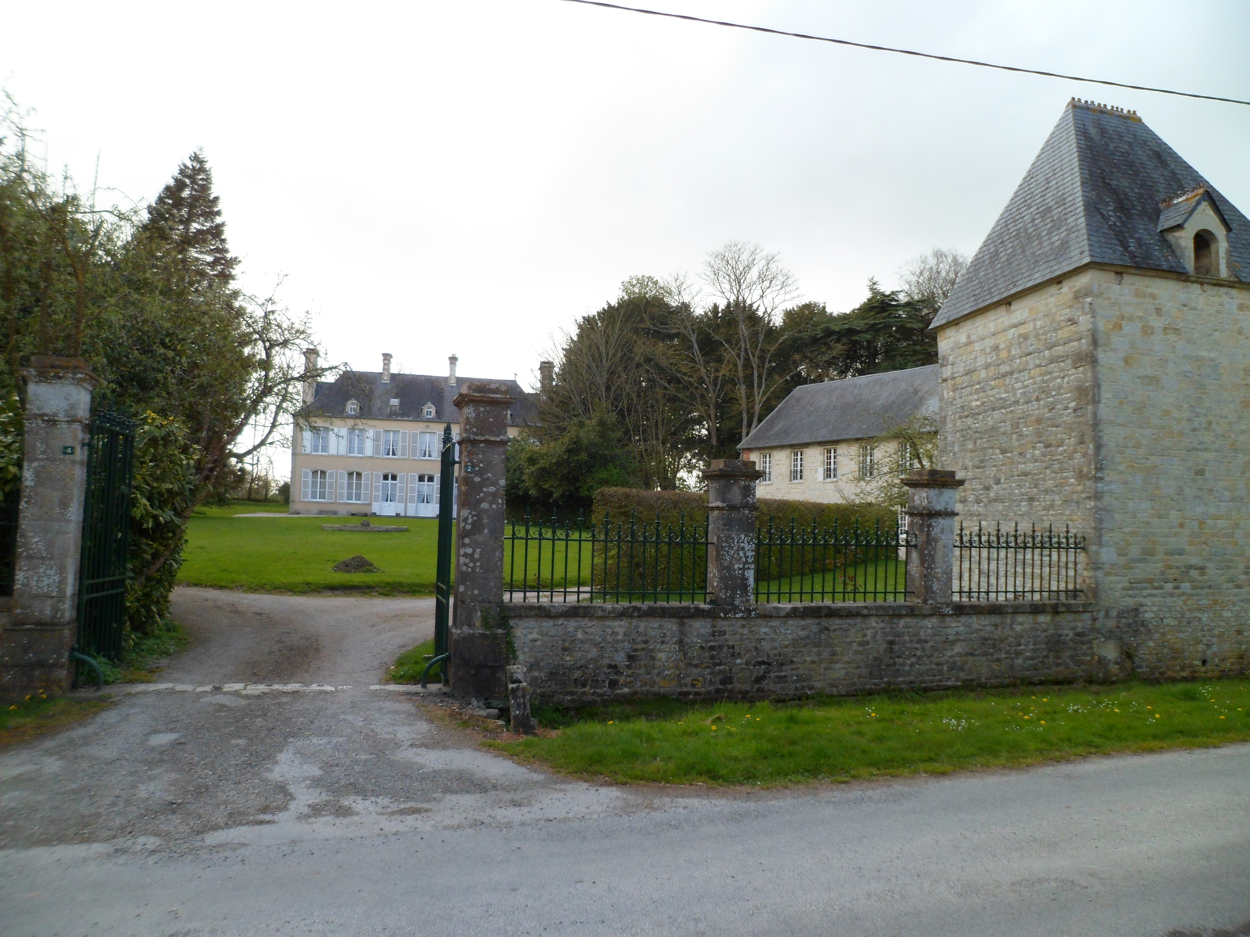 Hiesville